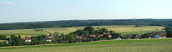 Blick auf Abtsgreuth